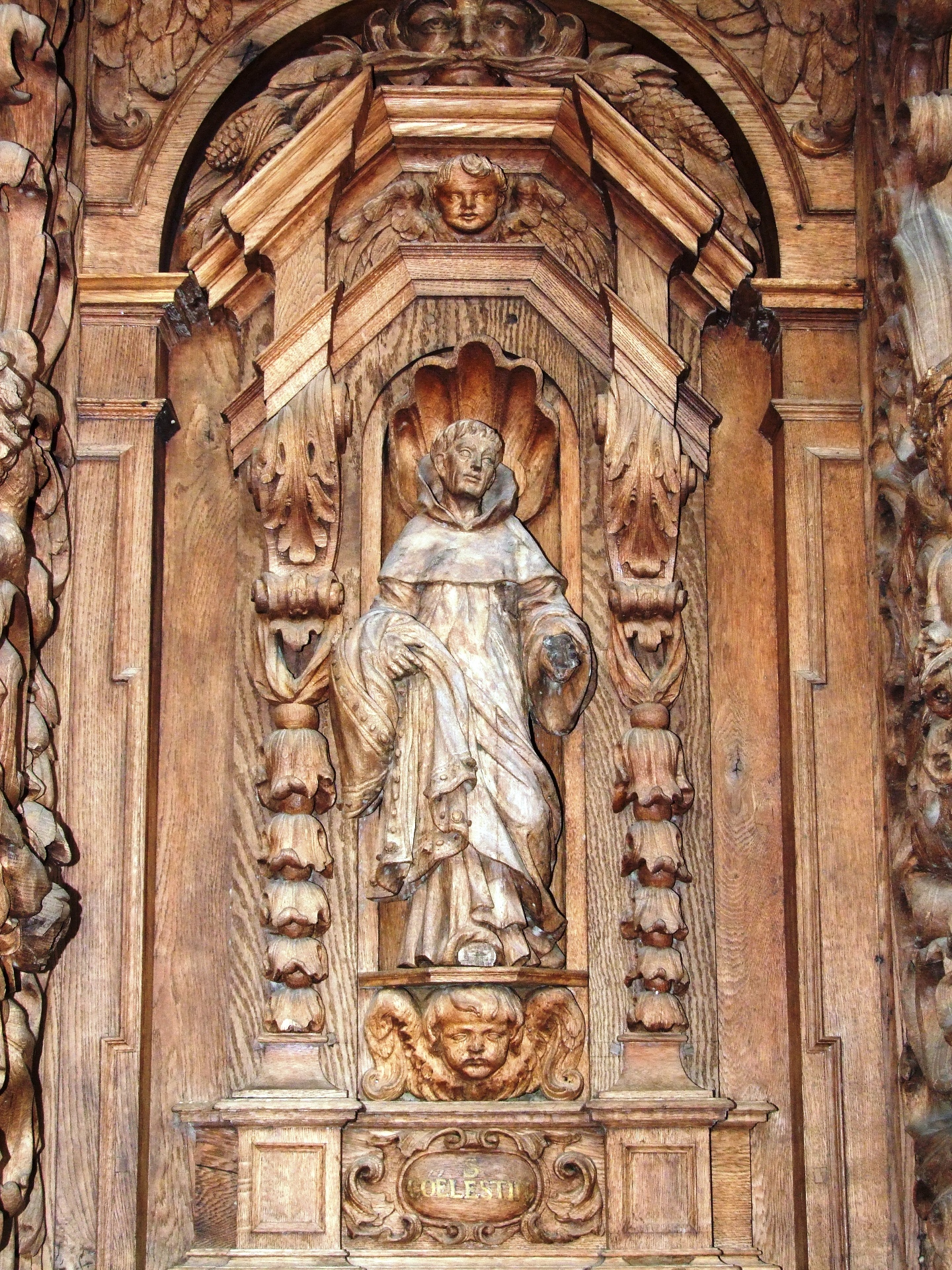 Das Chorgestühl in der Klosterkirche des ehemaligen Kartäuserklosters Buxheim: Petrus de Murrone